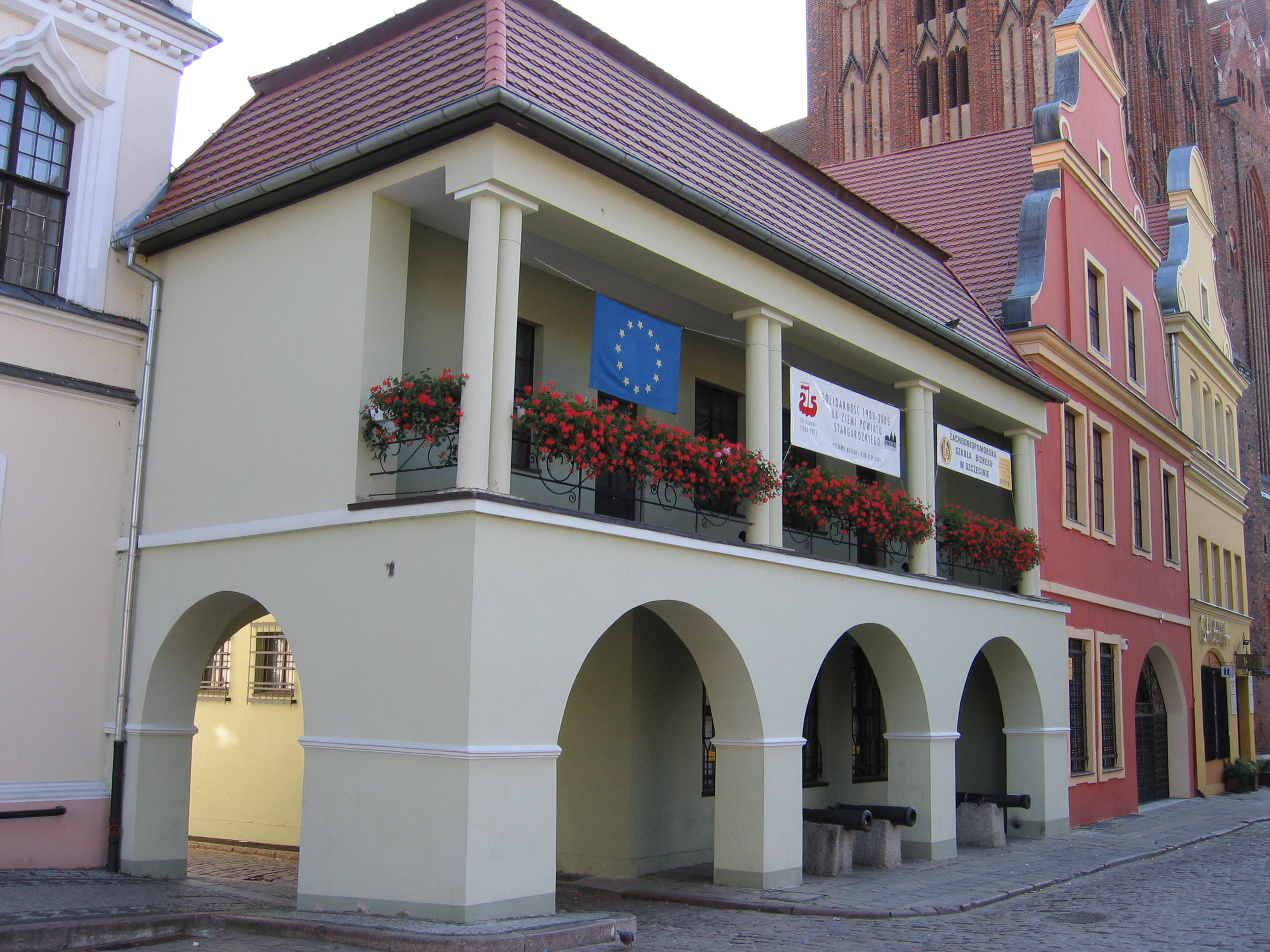 Stargard Szczeciński, Rynek Staromiejski - Odwach